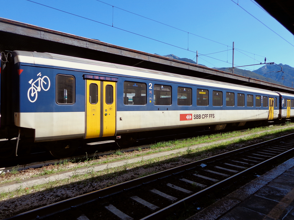 Carrozza B 50 85 20-35 175-2 delle Ferrovie Federali Svizzere, in composizione a un treno in sosta a Domodossola.